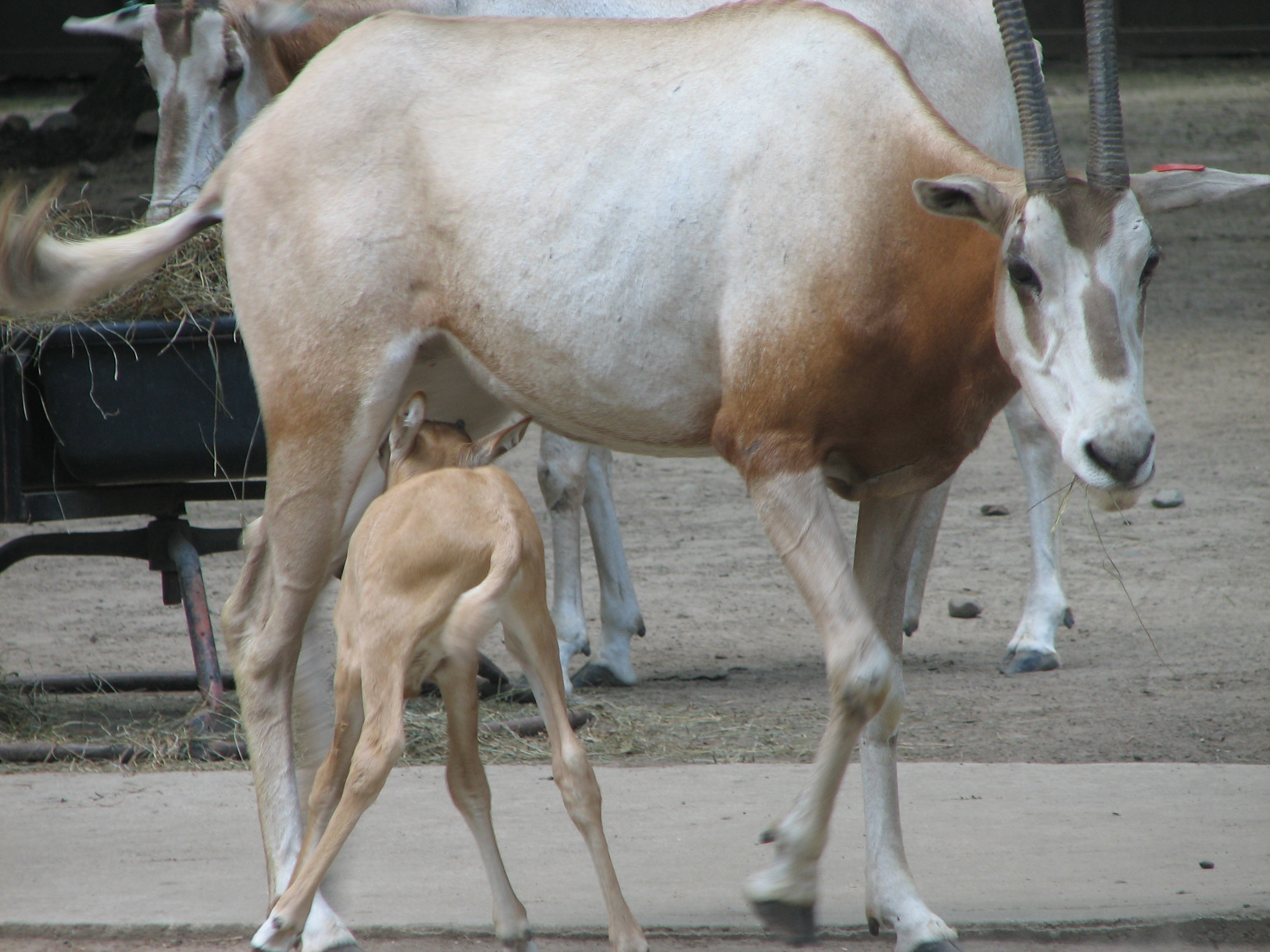 Orax Dammah